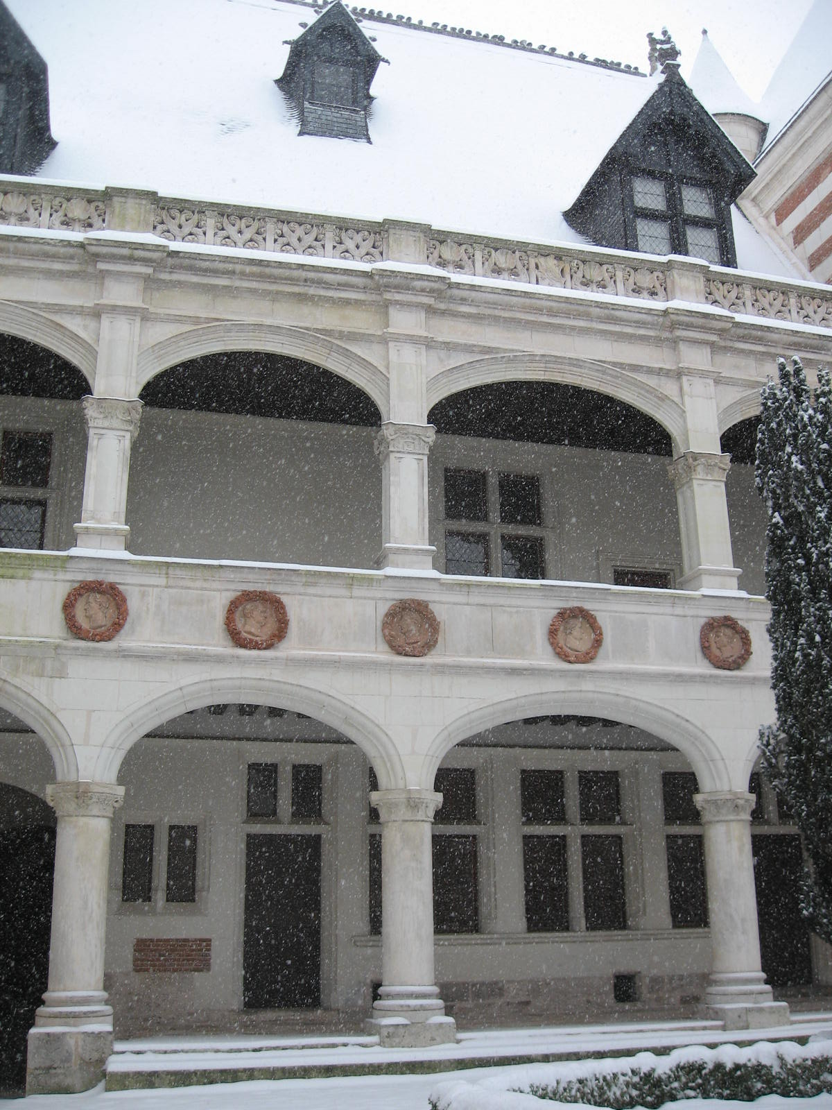 Façade sud et médaillons